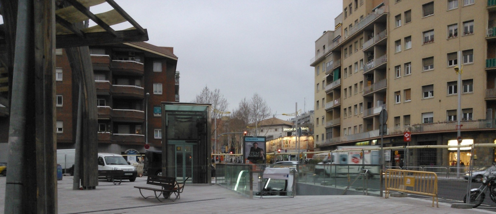 Obres de construcció d'un cinquè acces a l'estació de Virrei Amat